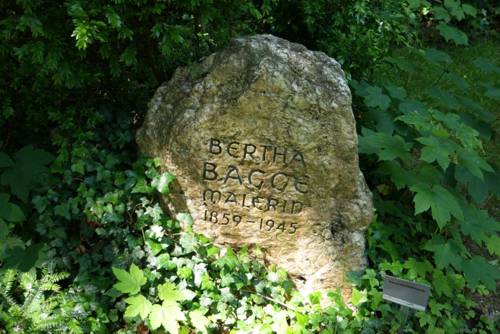 Grab der Malerin und Radiererin Bertha Bagge (1859-1939) auf dem Frankfurter Hauptfriedhof